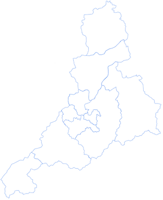 中文（中国大陆）: 济南区划图